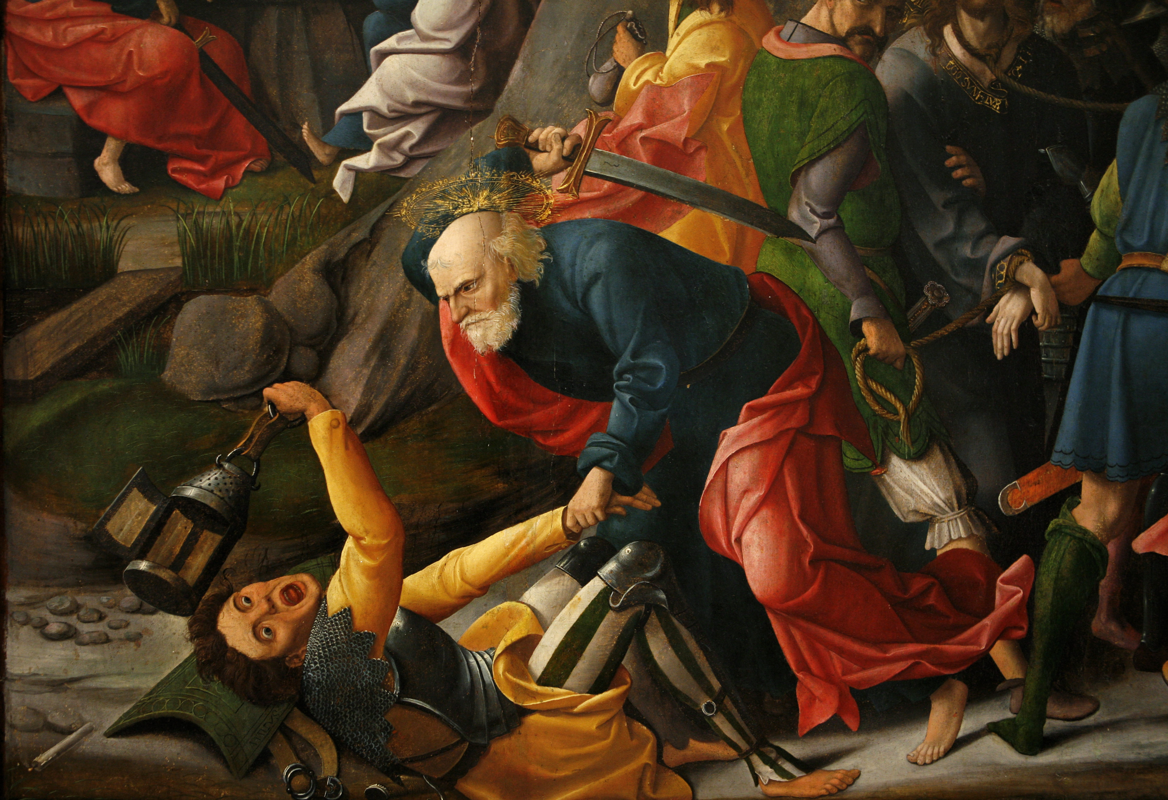 detail